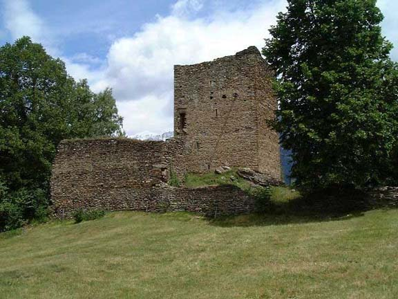 Hoch Rialt auf Hohen Rätien